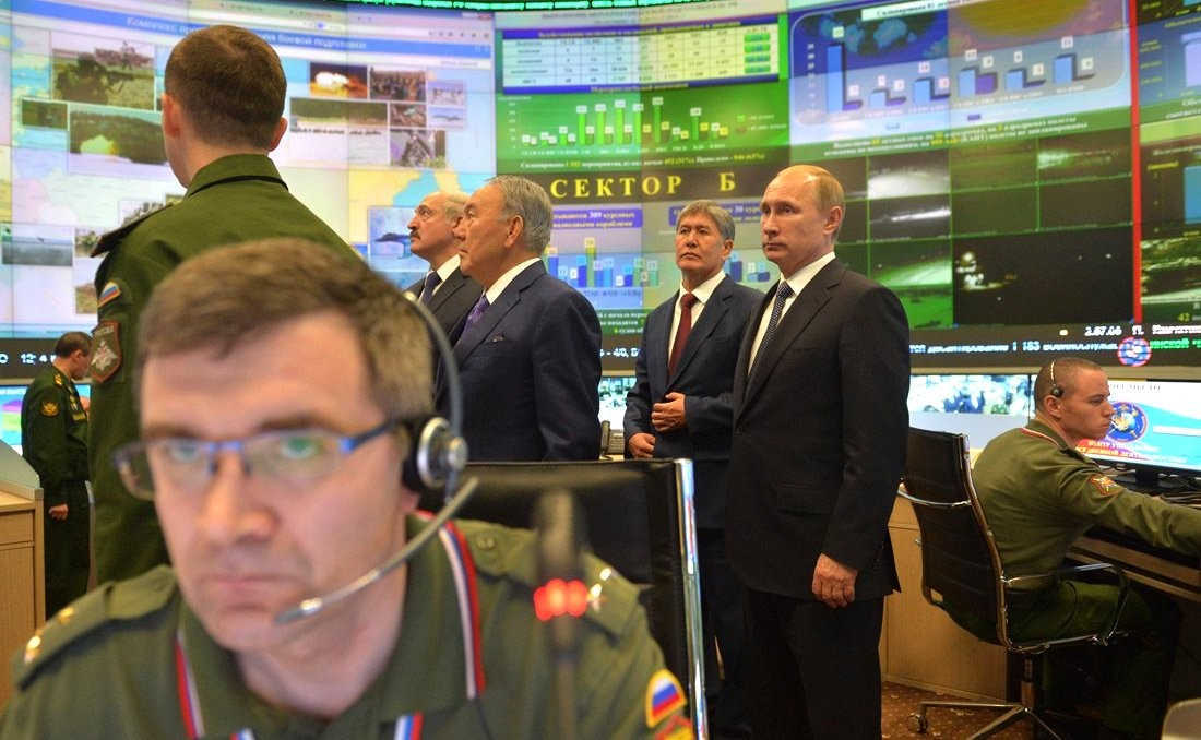 Главы государств – членов ОДКБ в Национальном центре управления обороной РФ